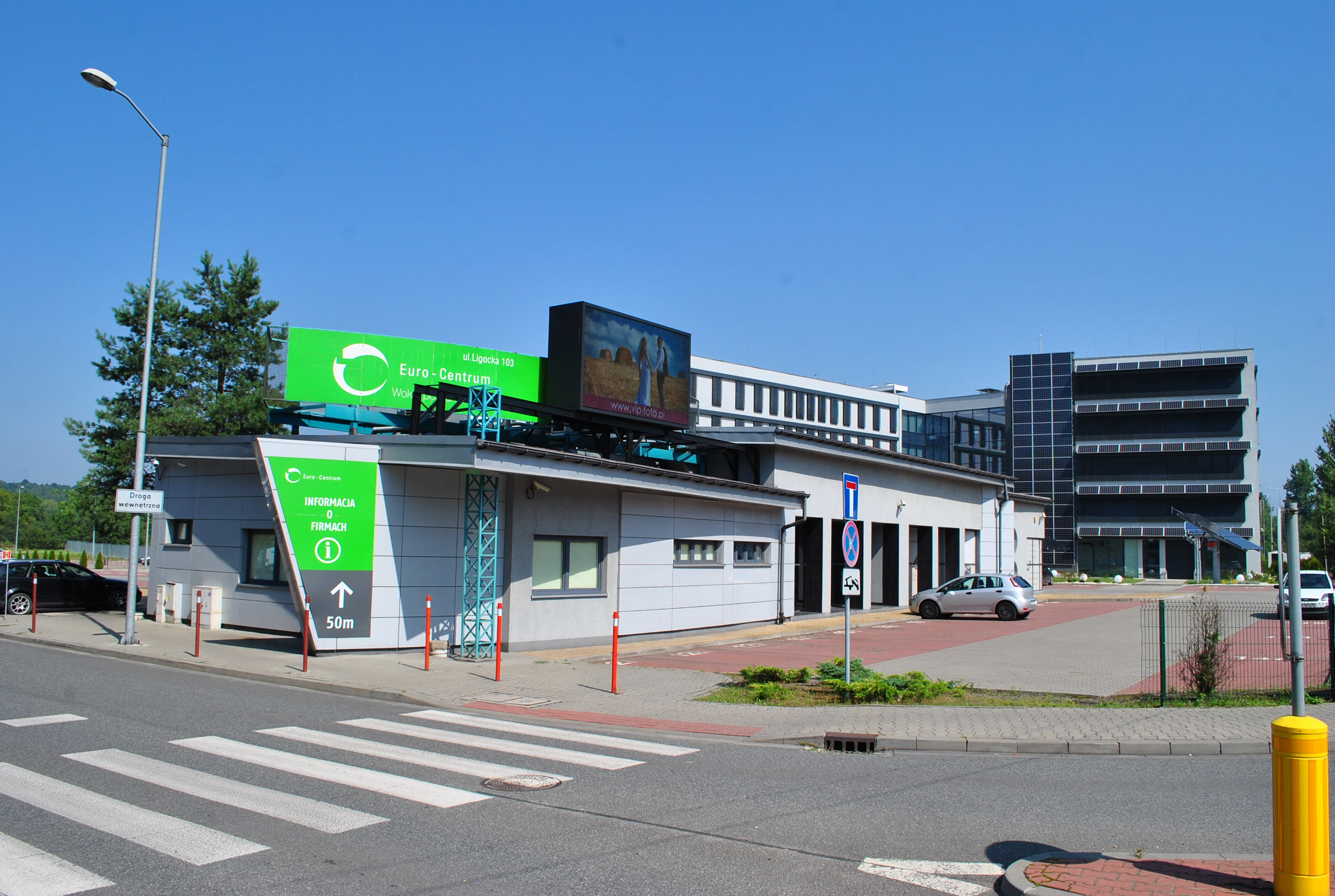 Katowice - Brynów. Euro-Centrum Park Przemysłowy przy ul. Ligockiej